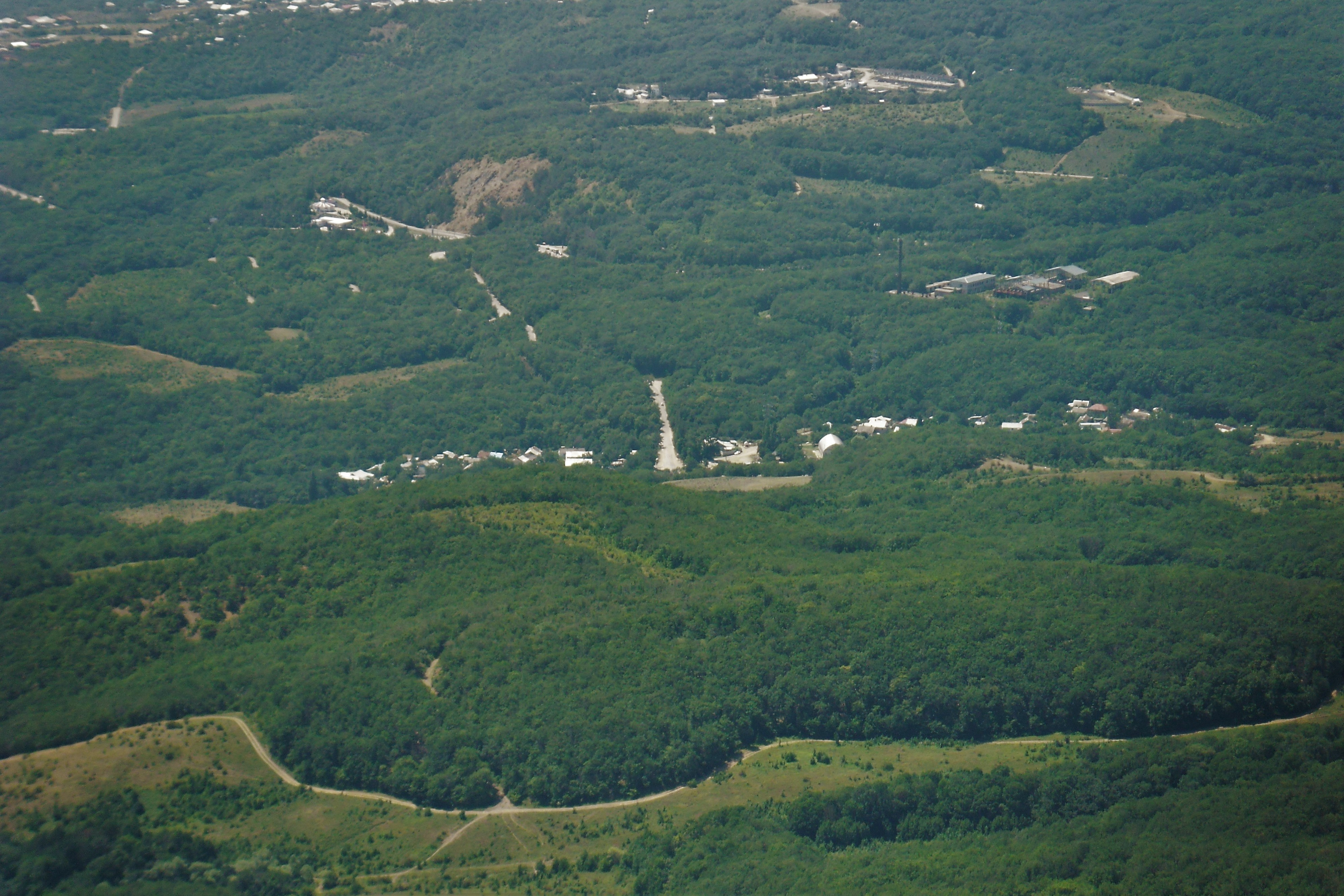 Фото